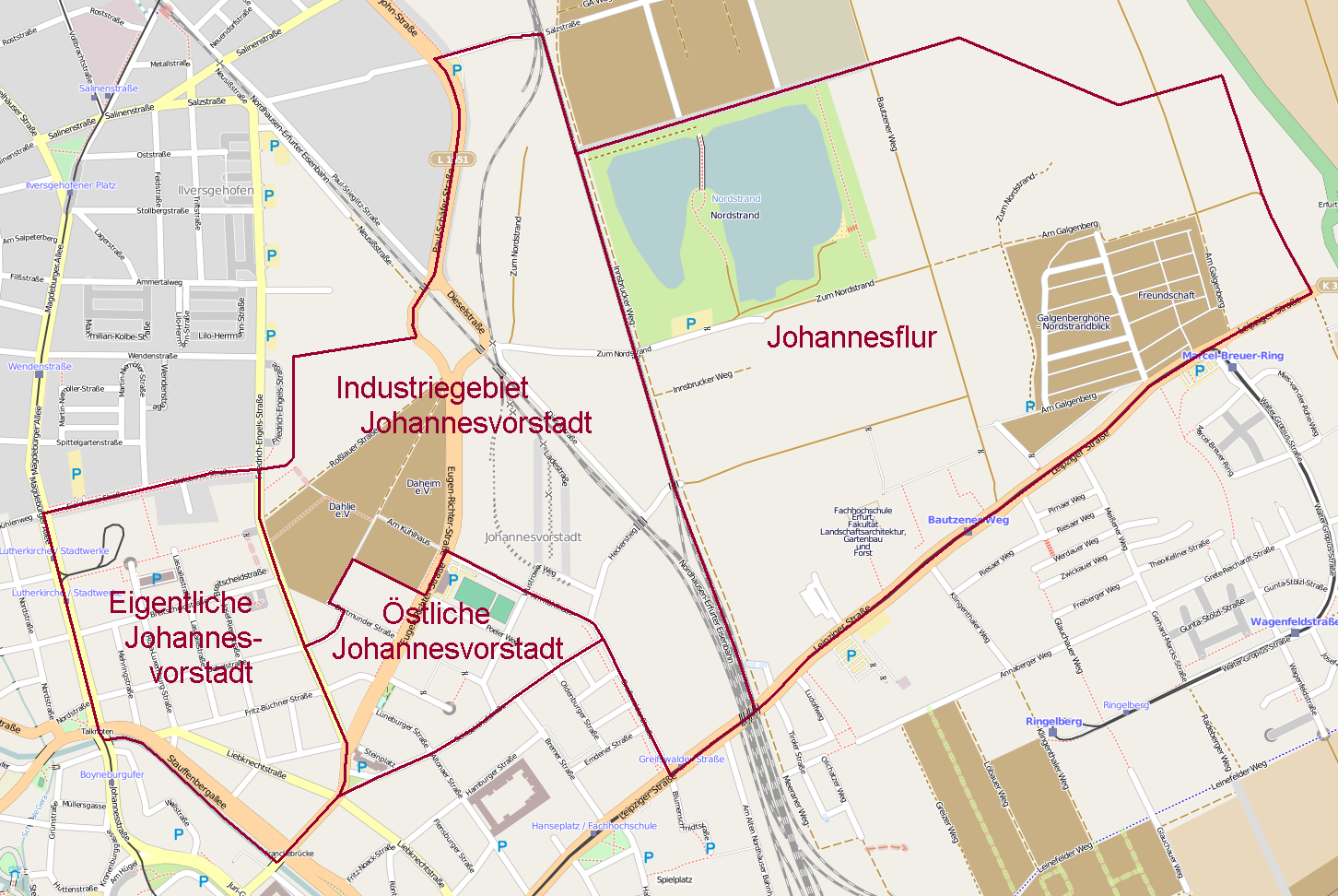 Eine Karte der Viertel im Stadtteil Johannesvorstadt von Erfurt.